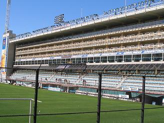 Palco de la Bombonera.